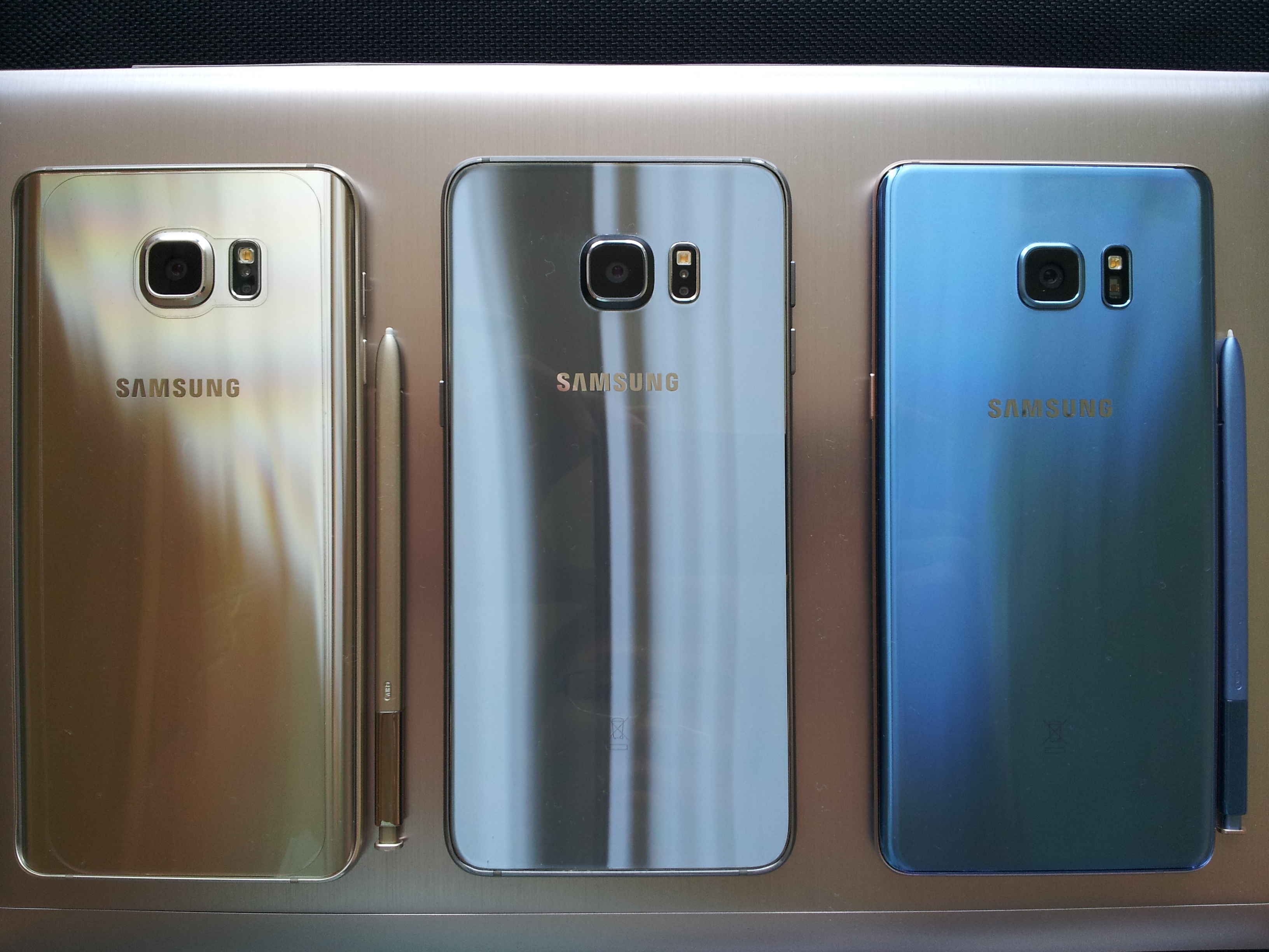 Samsung Smartphones Samsung Galaxy Note 5 (gold) Samsung Galaxy S6 edge+ (silver) Samsung Galaxy Note 7 (blue)